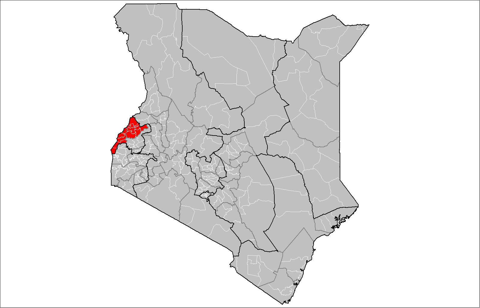 les comptés de Bungoma et Busia forment le diocèse catholique de Bungoma